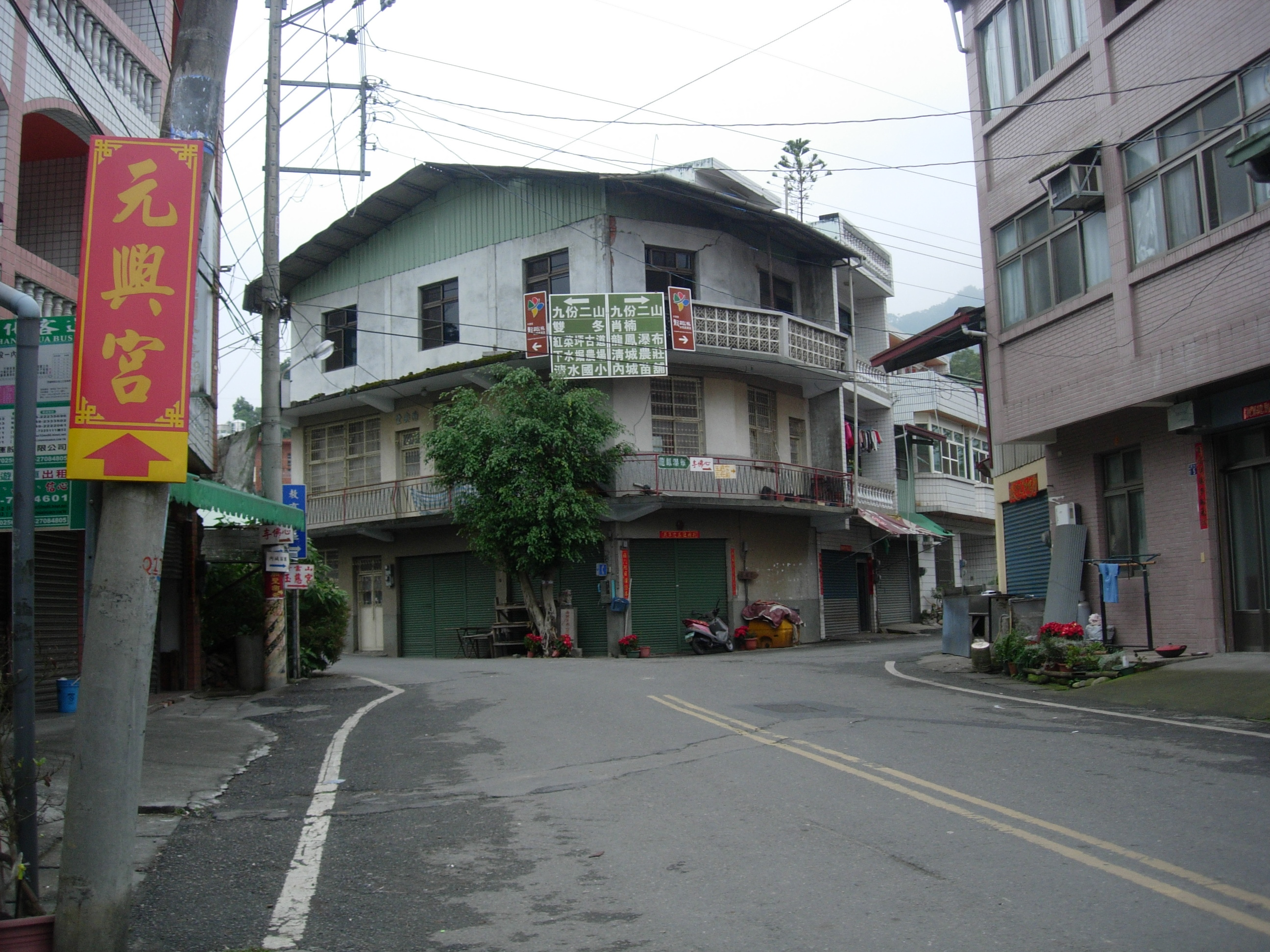 中文（台灣）: 中寮內城社區路口